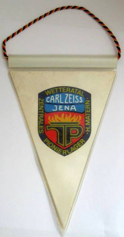 Erinnerungswimpel des Pionierlagers im Wetteratal